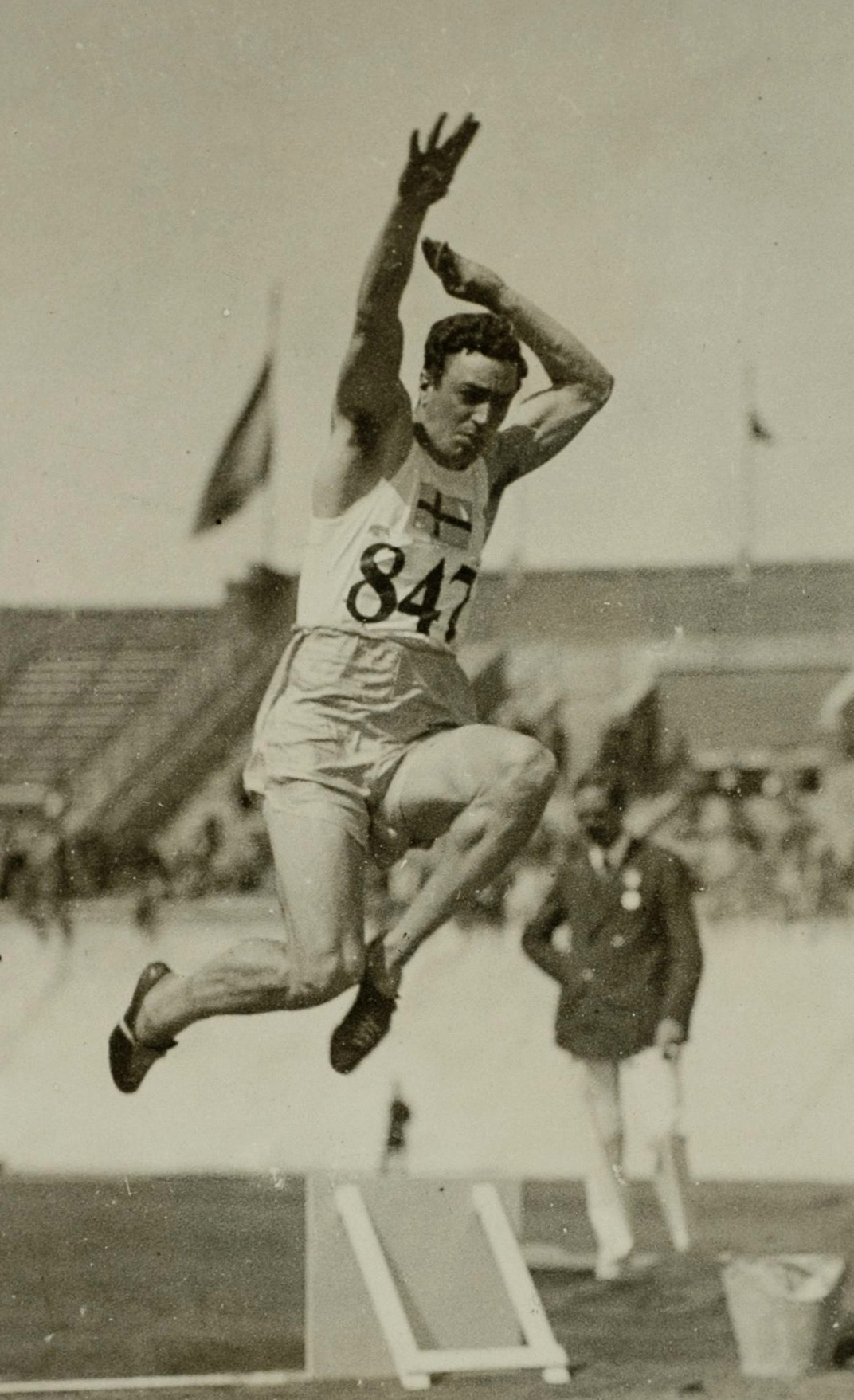 Sport. Sport, Olympische Spelen Amsterdam, 1928 : De Zweed H. Jansson bij het verspringen tijdens de tienkamp.